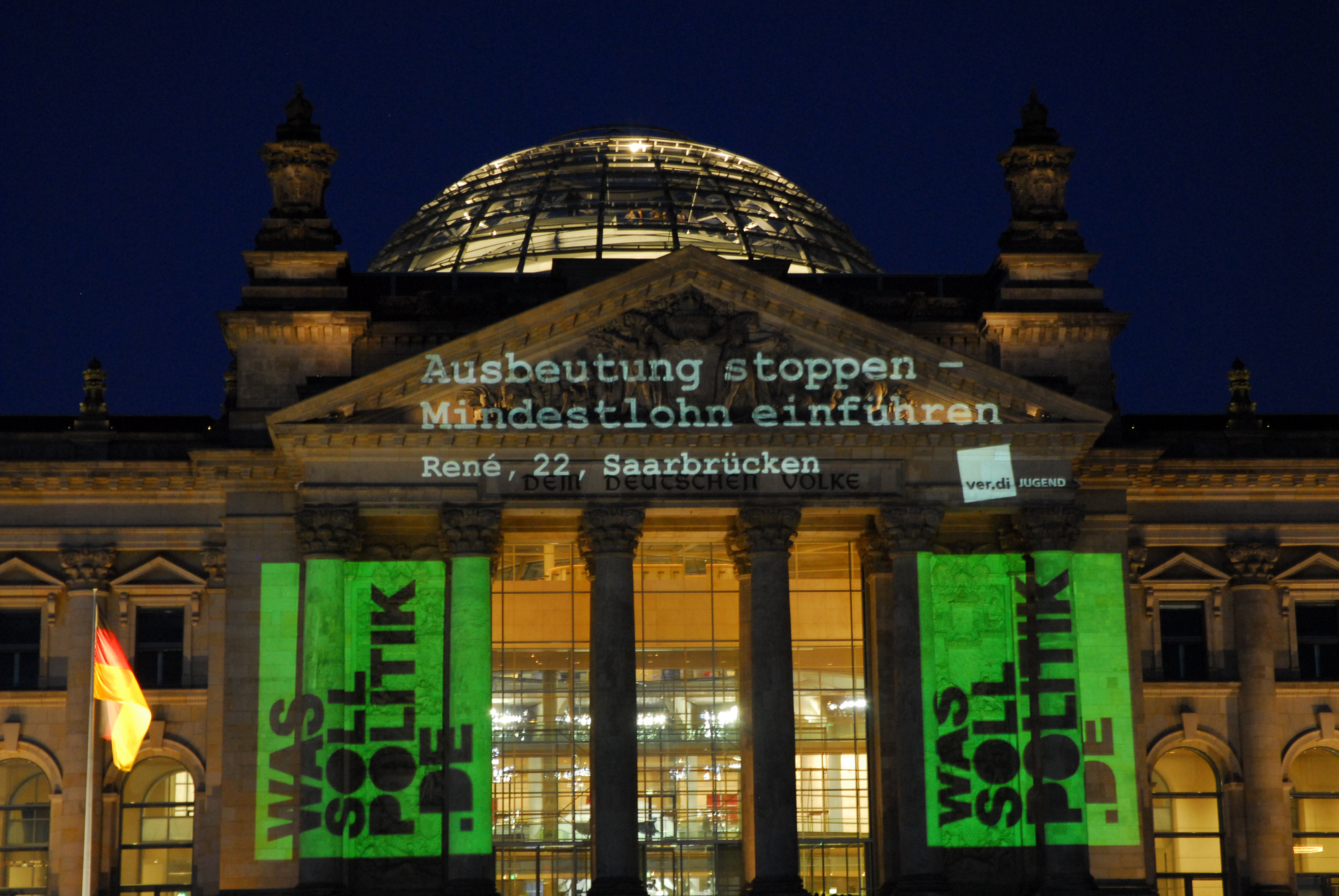 Das Reichstaggebäude in Berlin wird mit einem Beamer beleuchtet Ja, von ver.di Jugend genehmigt